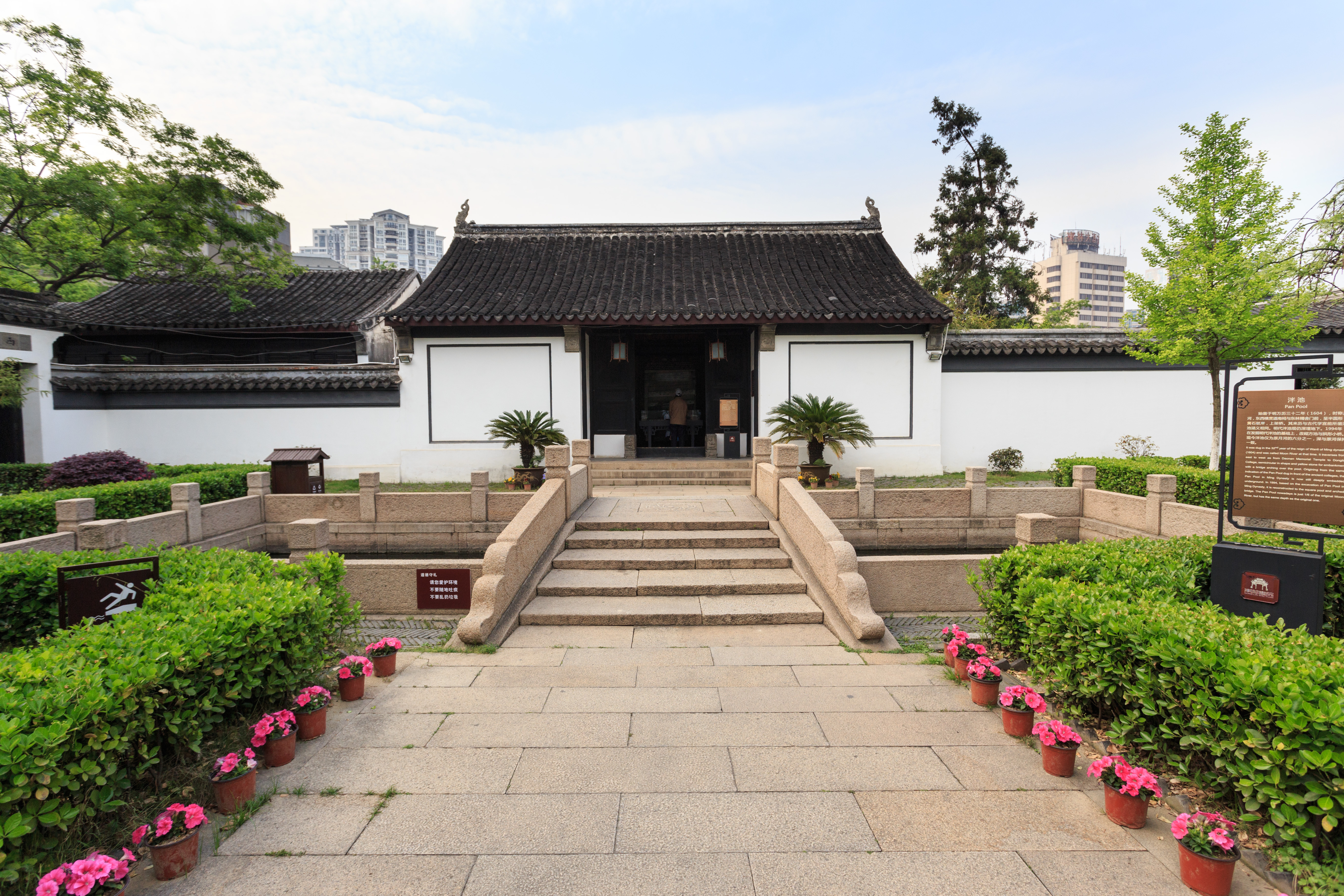 无锡东林书院 泮池和东林精舍